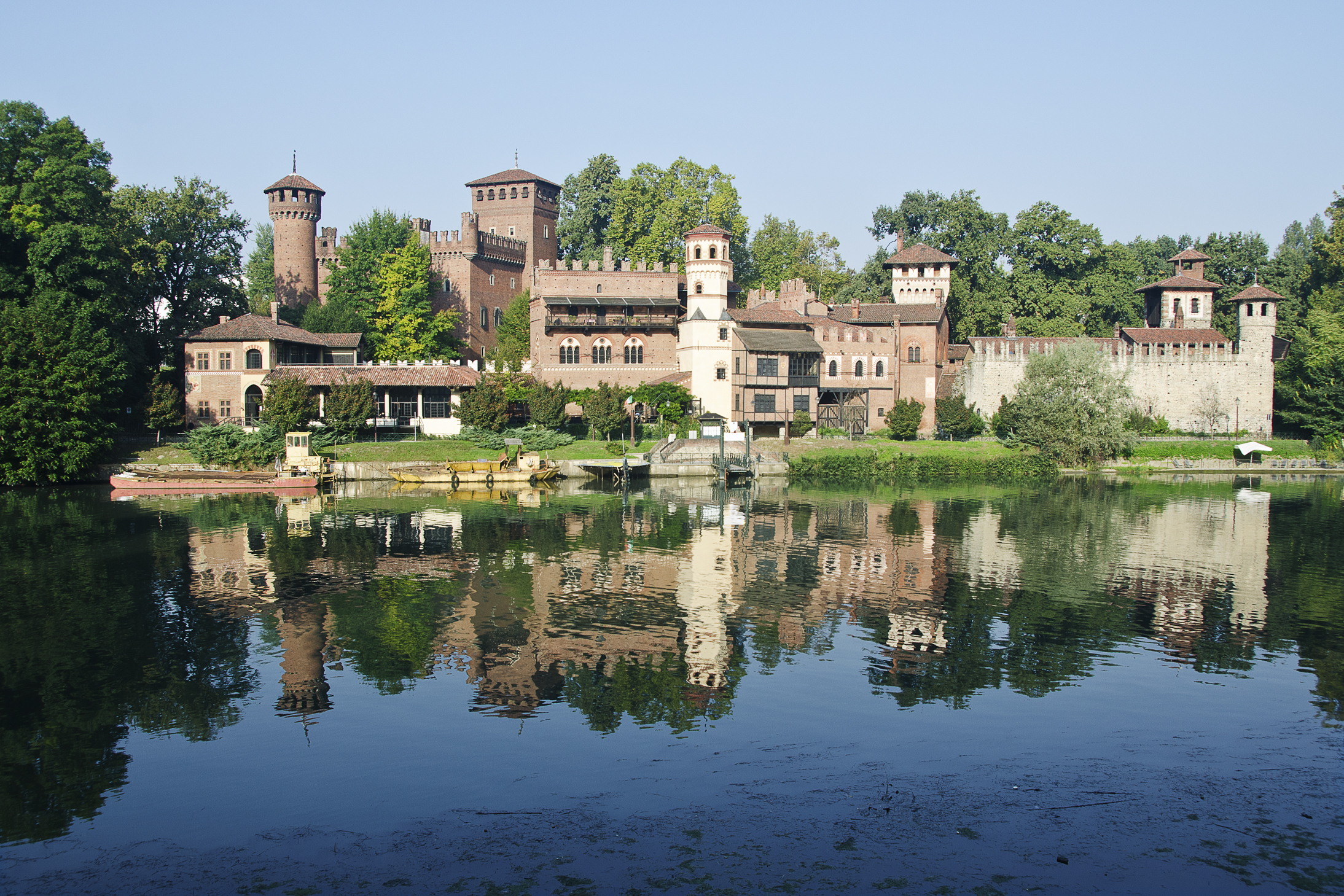 Borgo medioevale di Torino This is a photo of a monument which is part of cultural heritage of Italy.